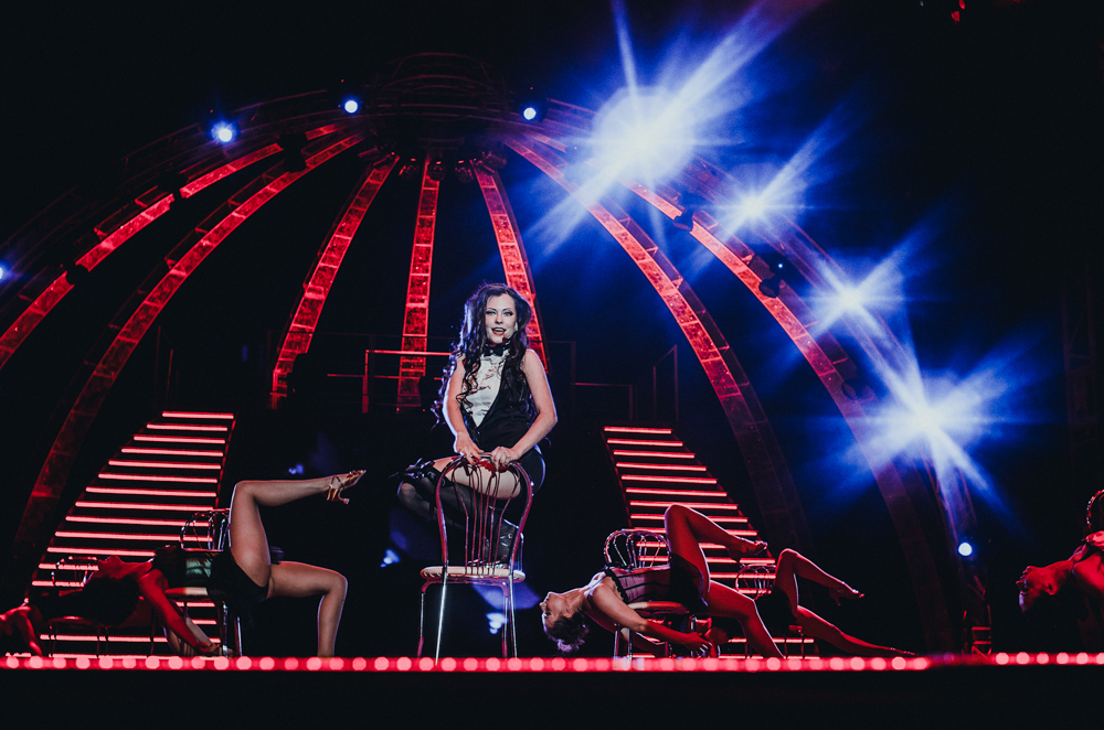 «Мэрилин Монро. Образ затмивший жизнь» Театр мюзикла Комильфо